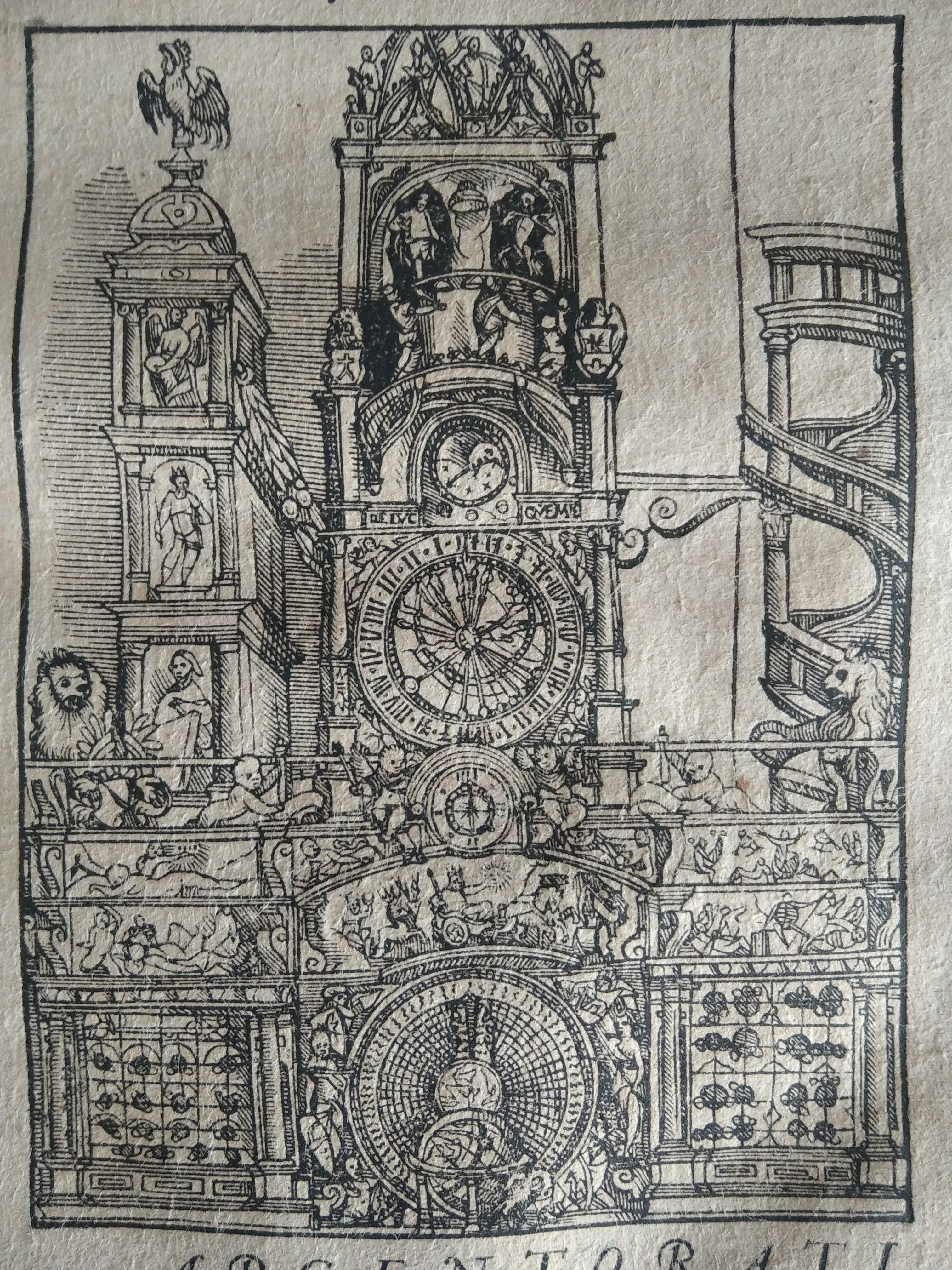 Illustration de l'horloge astronomique de Strasbourg sur la page du grand titre du livre de 1575 Carmen de astronomico horologio Argentoratensi écrivé par Nicodemus Frischlin. Publié à Strasbourg par Nikolas Wyriot.